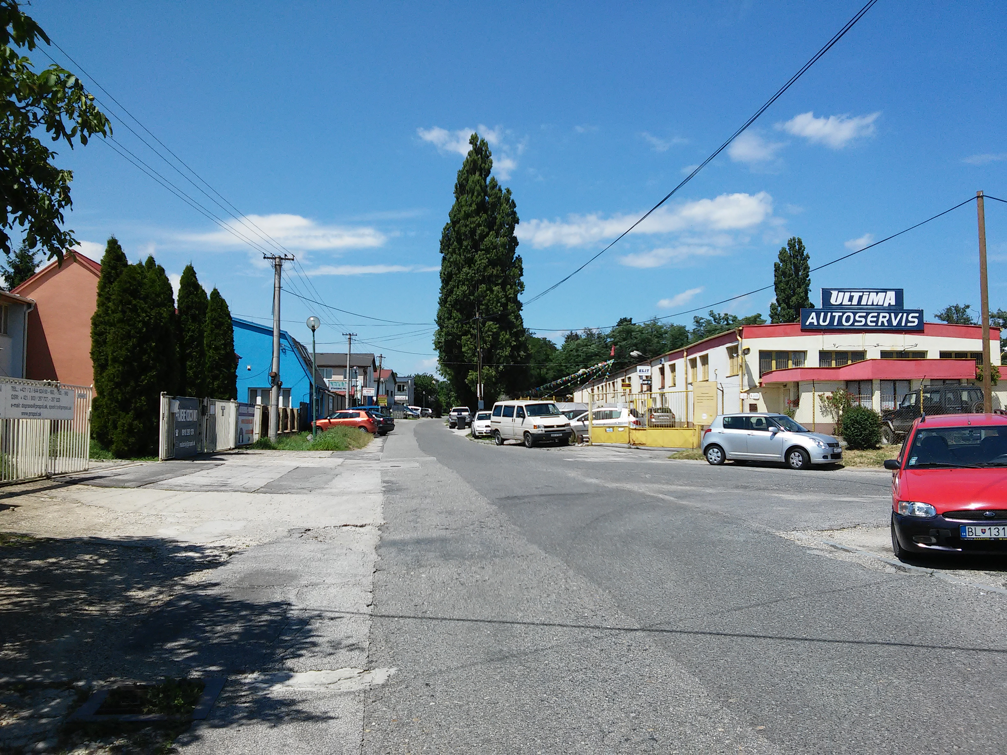 Furmanská, Lamač, Bratislava